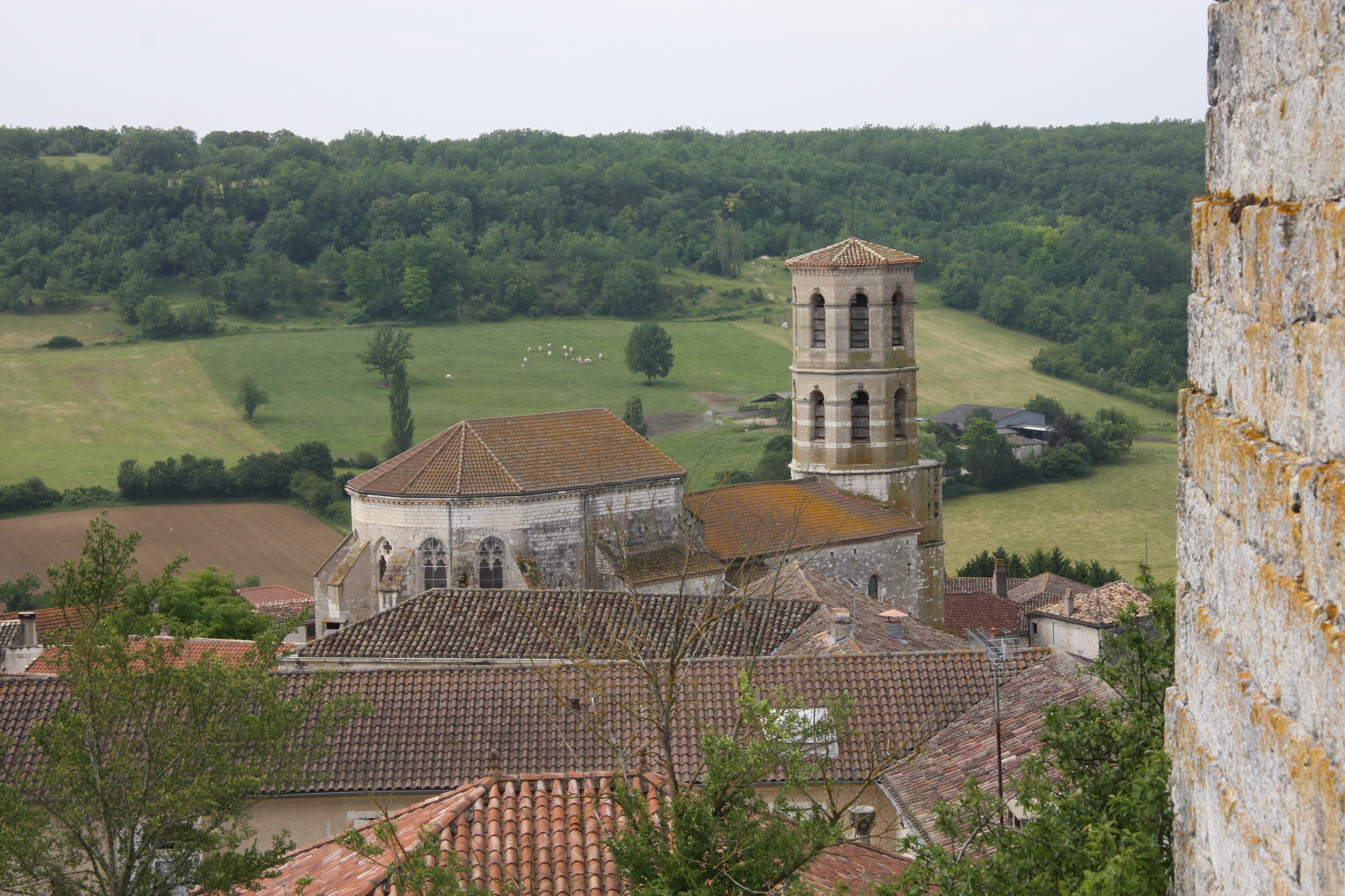 L'église Saint-Hilaire vue du donjon